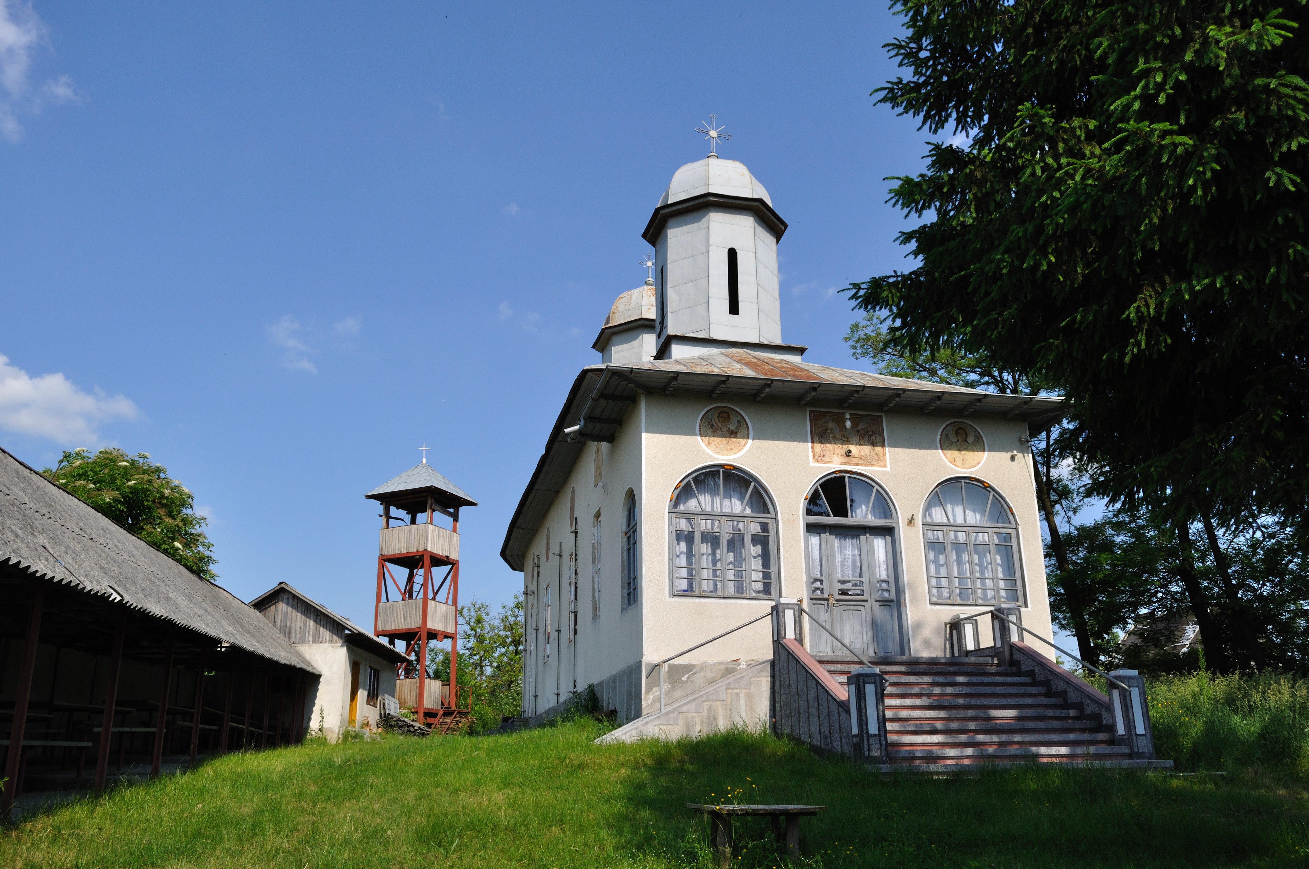 Biserica de lemn „Adormirea Maicii Domnului” (1798-1799) din Armășești